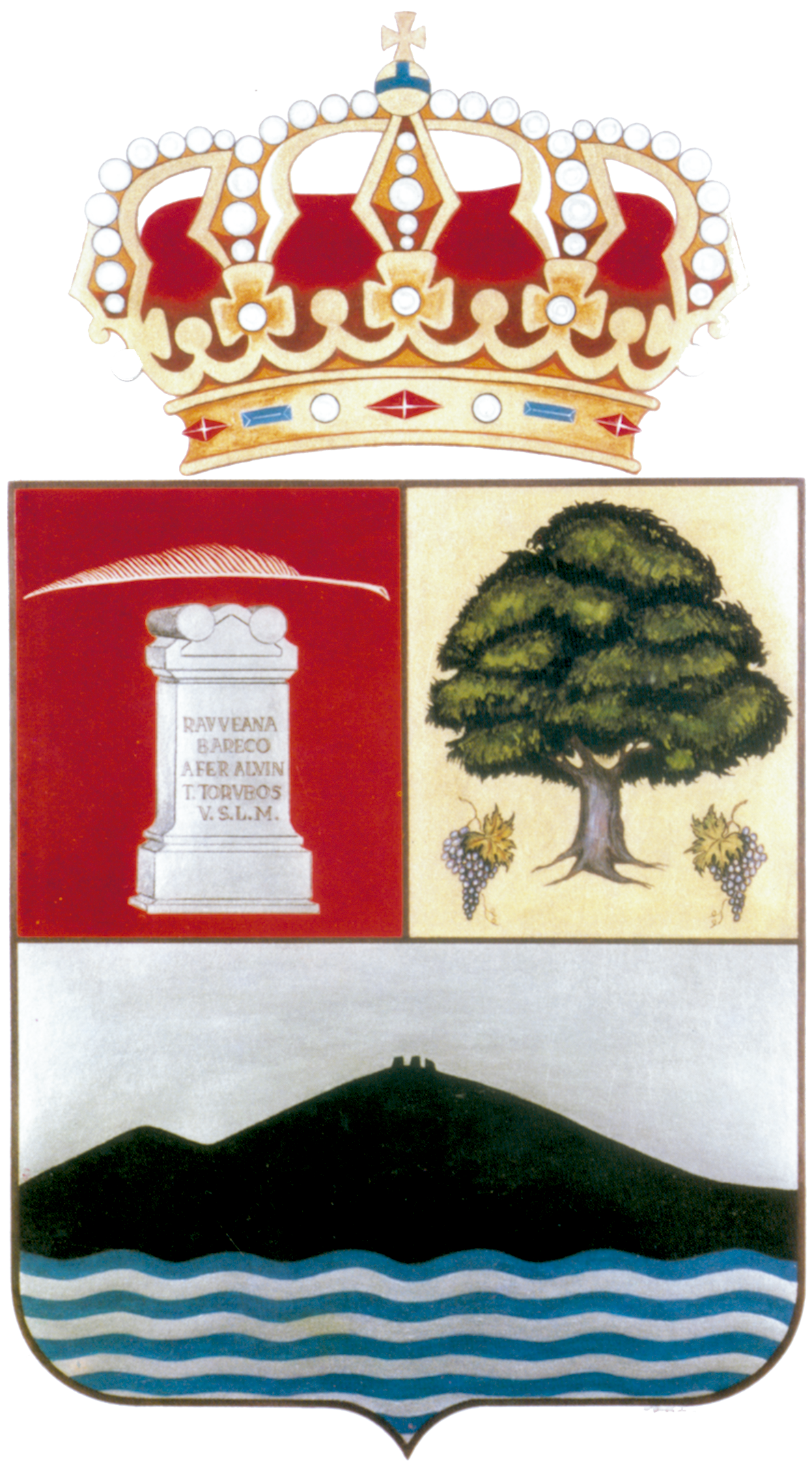 Escudo Rubiá de Valdeorras